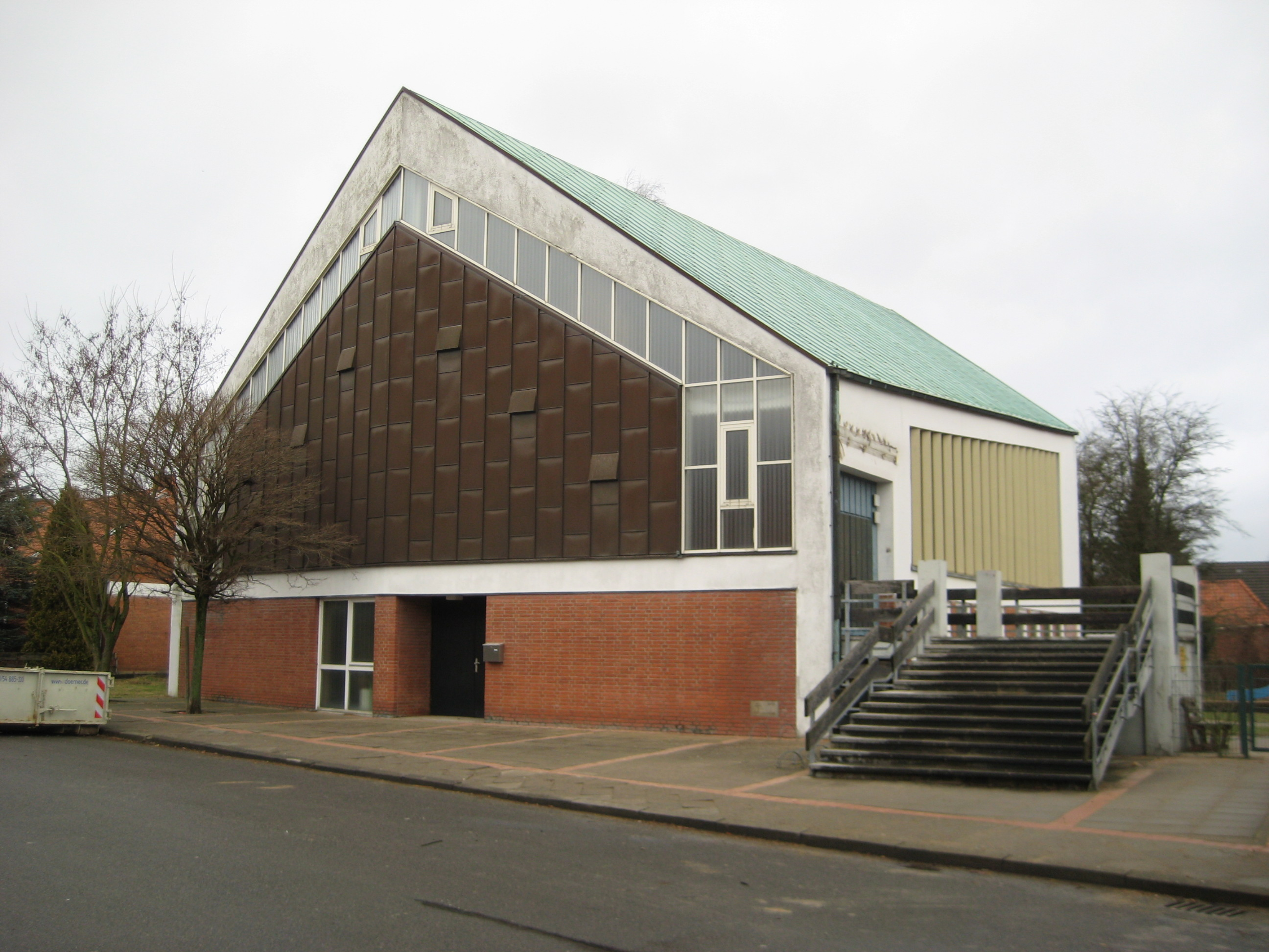 St. Lazarus ohne Turm